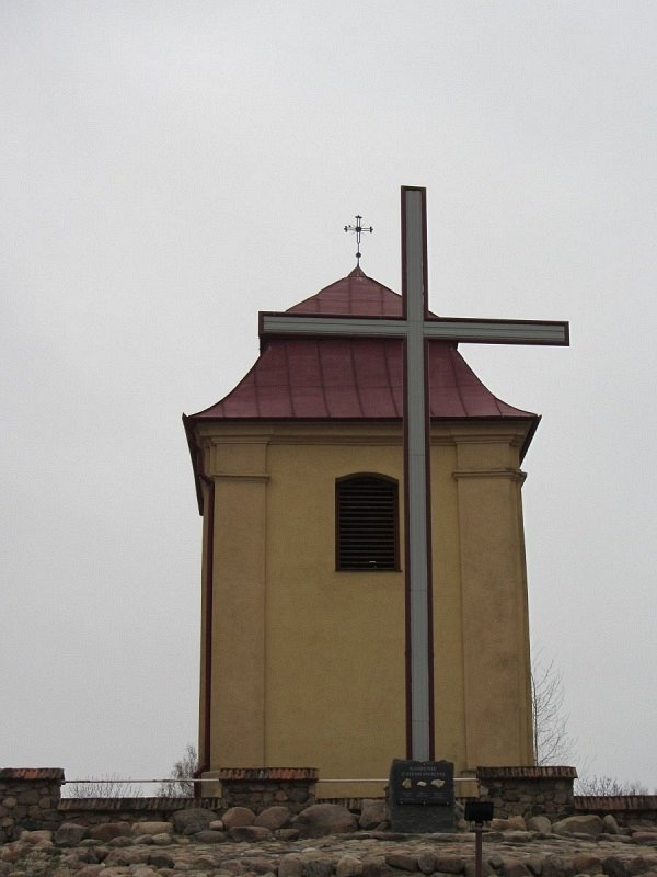 Крамяніца. Касцёл. Званіца